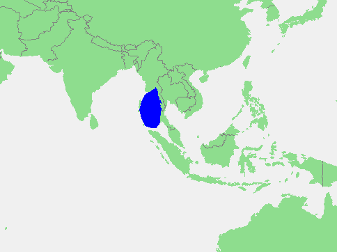 Andaman Sea